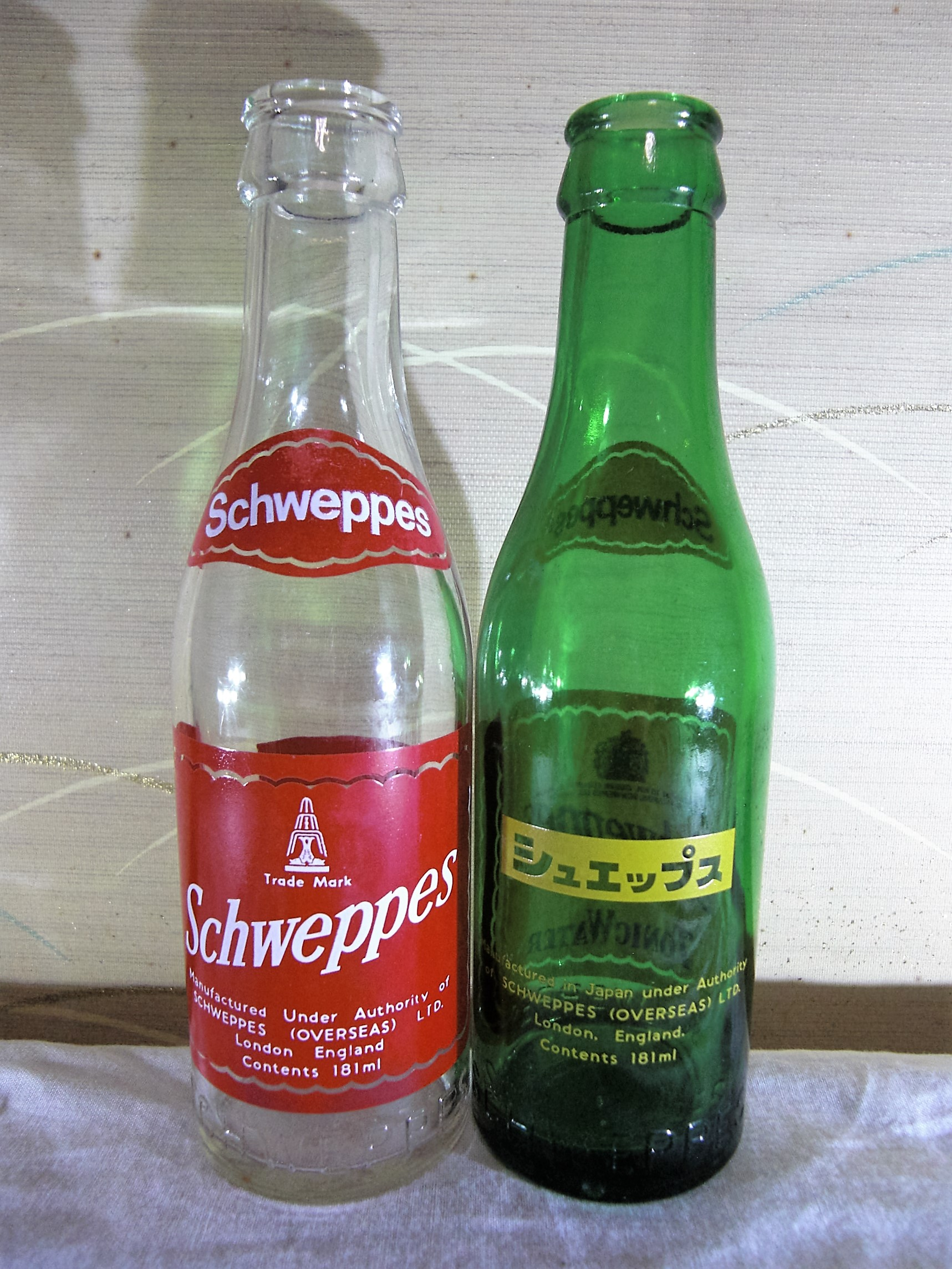 1962年日本ソフトドリンク社から発売当初の瓶